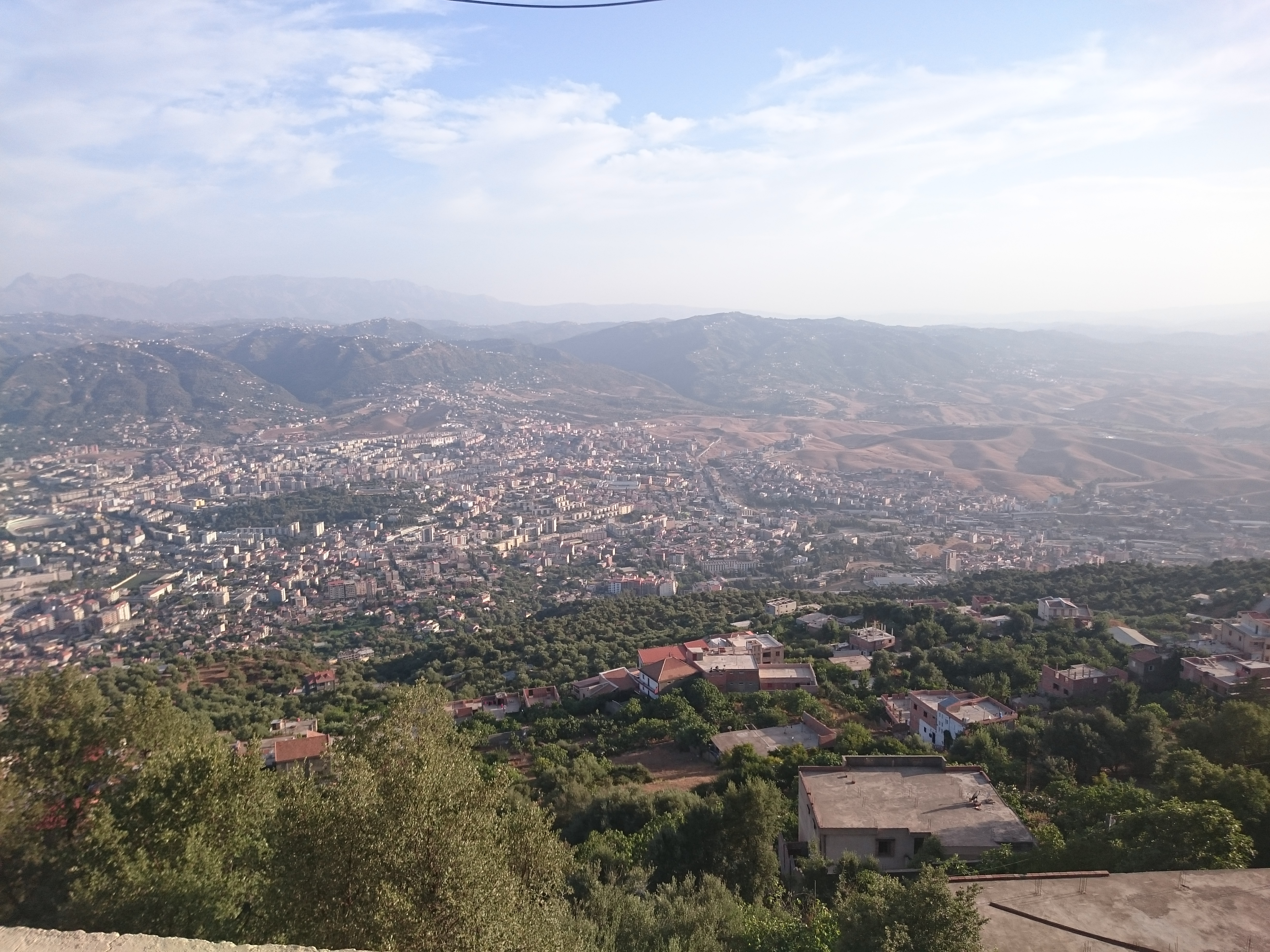 cette photo prise en 2015 donne un vue d'ensemble sur le panorama de Tizi-Ouzou